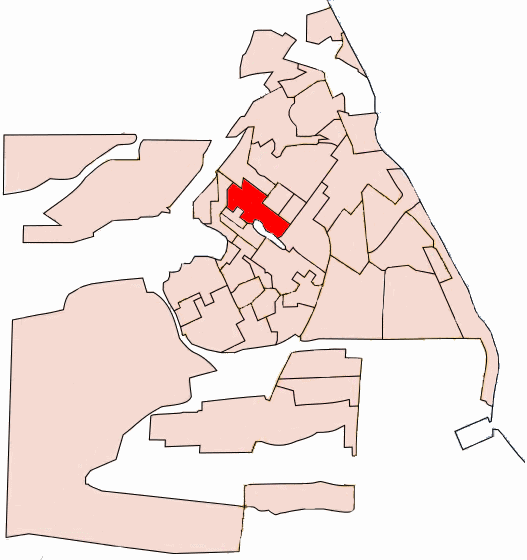 Barrio Perito Moreno